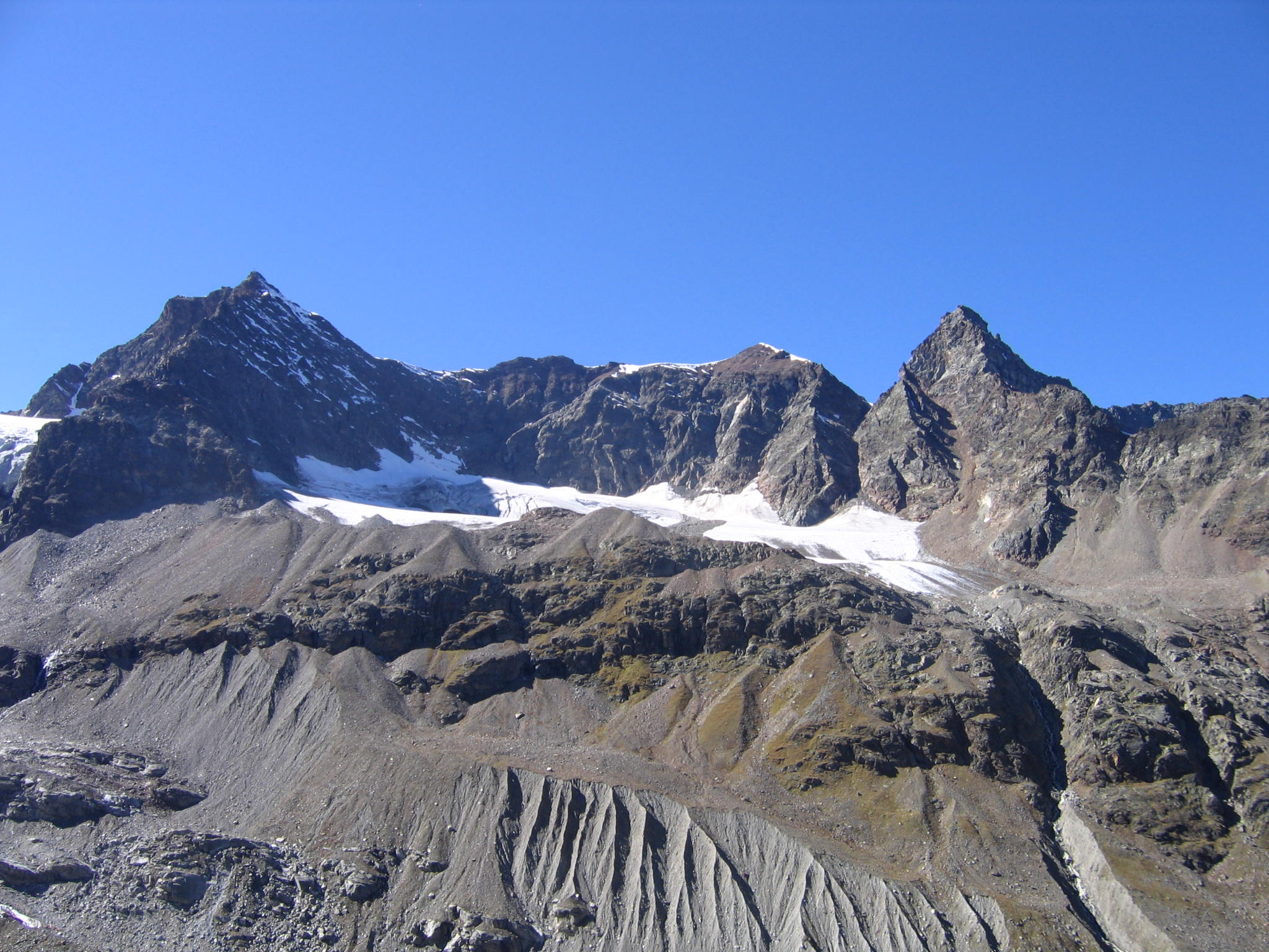 Blick von der Wiesbadener Hütte (2443 m) auf das Silvrettahorn, Schneeglocke (3223 m) und das Schattenspitze (3202 m), darunter der Schneeglockengletscher.